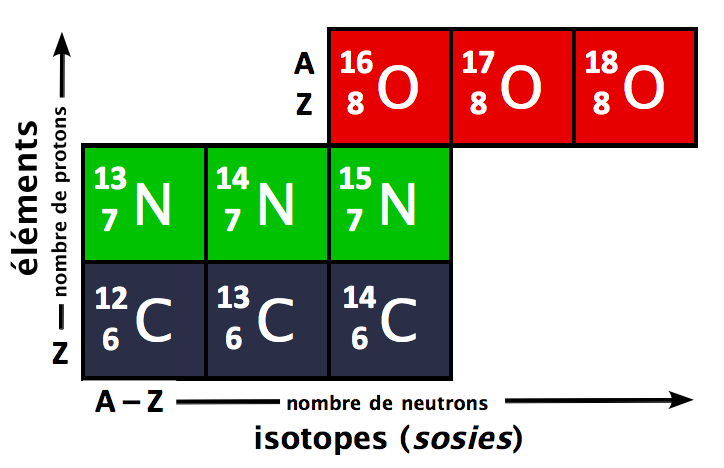 isotope, poids atomique, nombre de masse, protons, neutrons, carbone 14, éléments